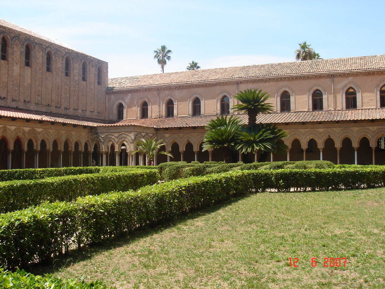 Cattedrale di Monreale. Внутренний дворик (клуатр) монастыря Монреале (Сицилия)